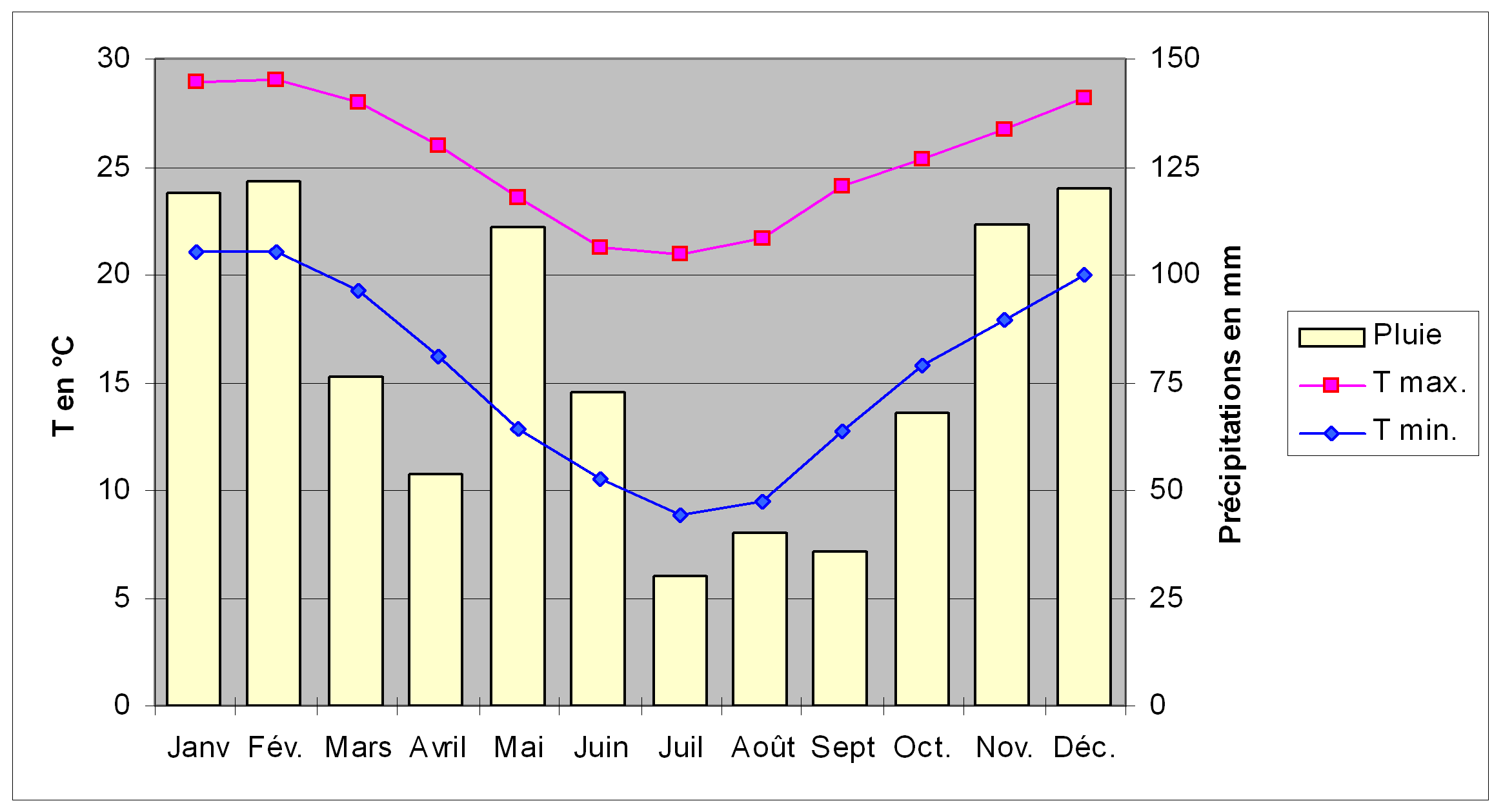 Diagramme climatique de la ville de Brisbane (Australie), comprenant deux courbes, représentant les températures maximales et minimales, et un histogramme, représentant la pluviométrie, pour les douze mois de l'année.